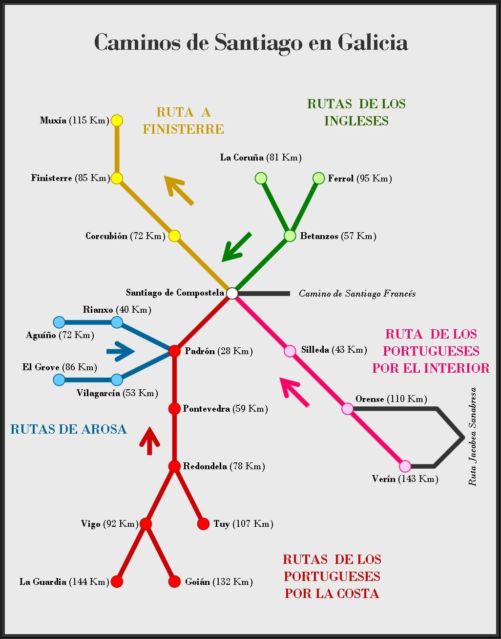 Esquema de los Caminos de Santiago en Galicia.